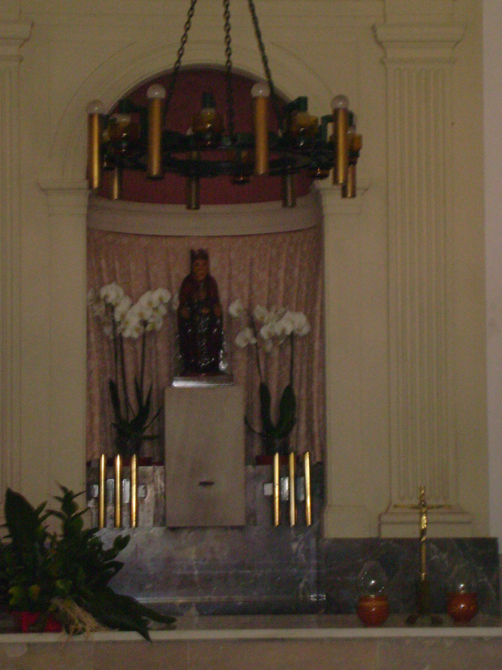 Escultura de la Mare de Déu de Lloseta